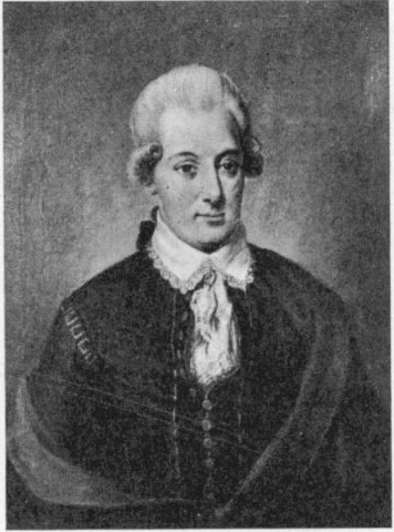 Johan Christian Adelsköld (1737-1798). Pudrad peruk, svart-röda svenska dräkten, gråtonig fond.